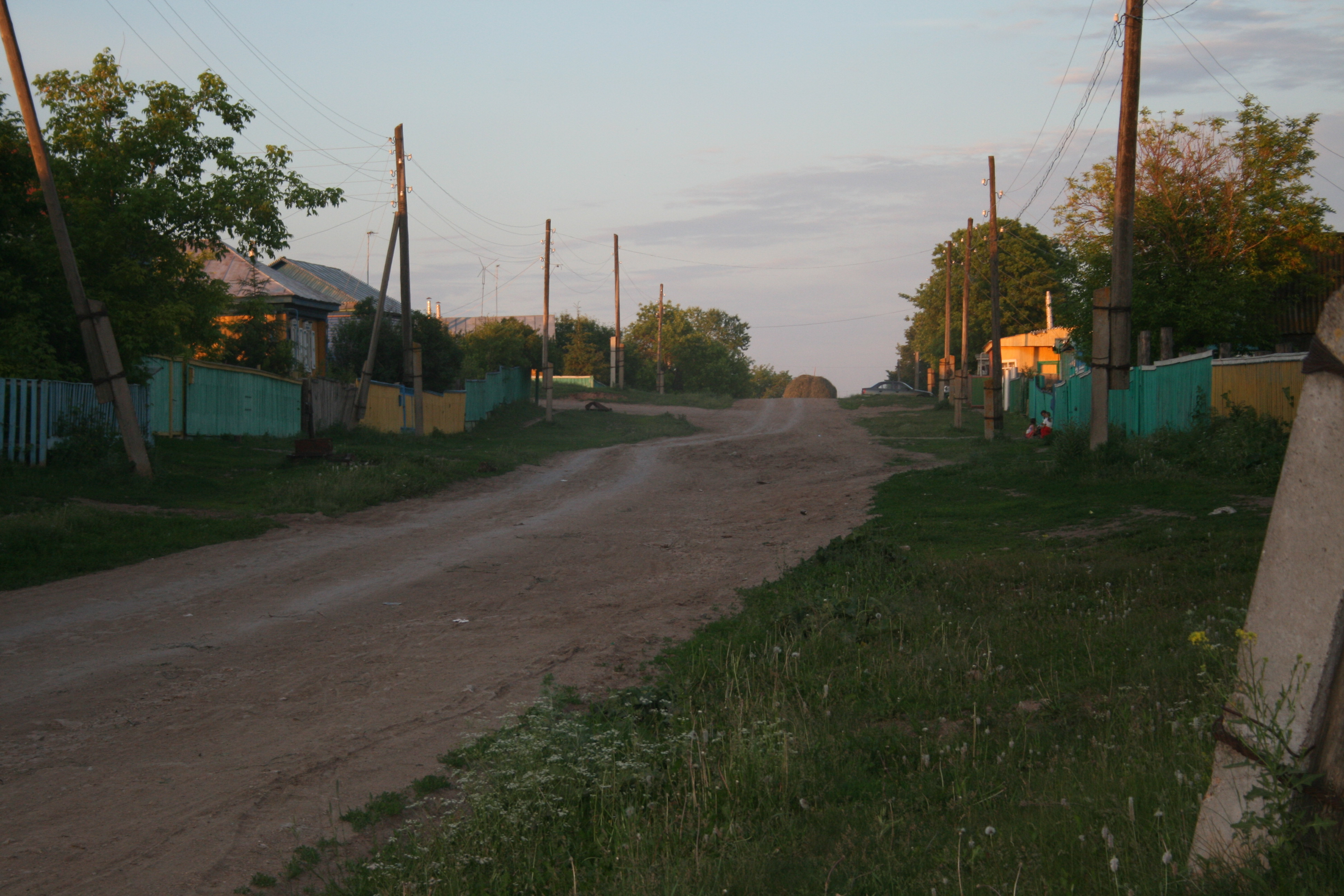 Starokalmashevo, Gagarin street